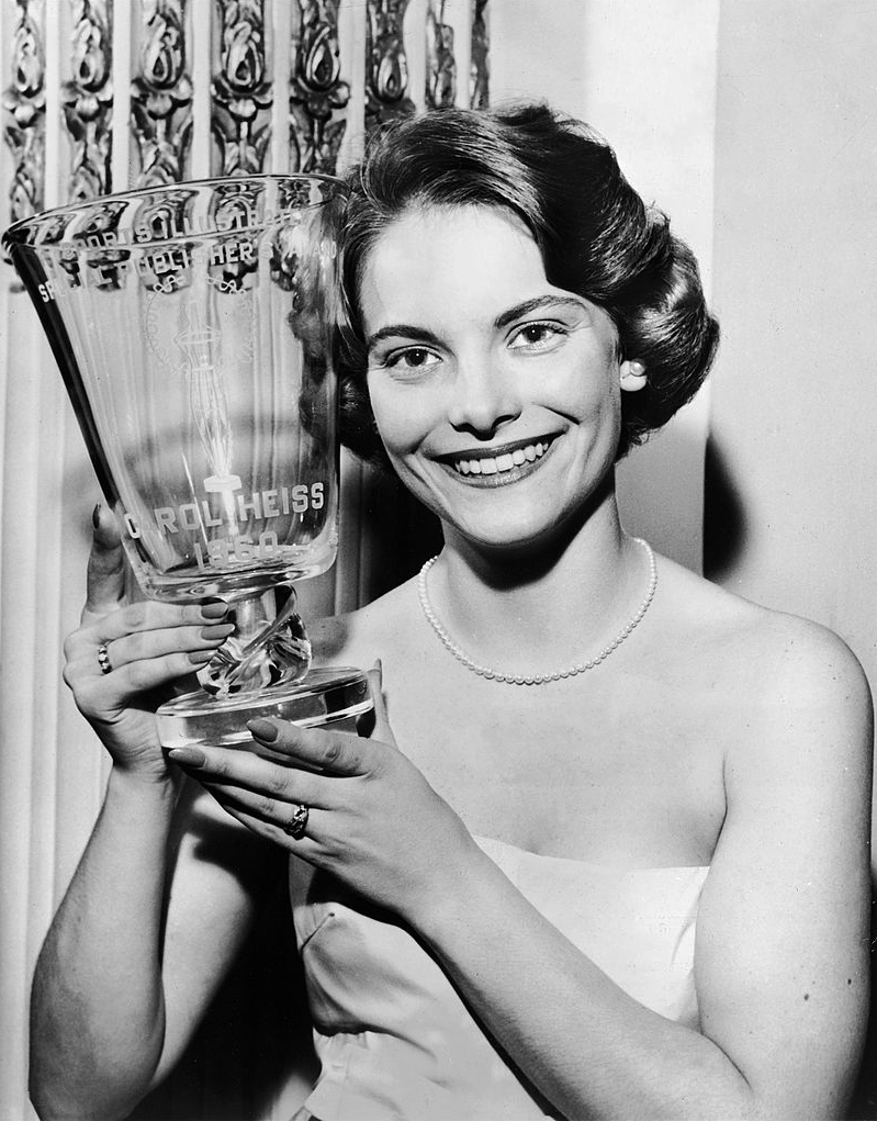 1960 Figure Skater Carol Heiss With Steuben Glass Trophy Press Photo